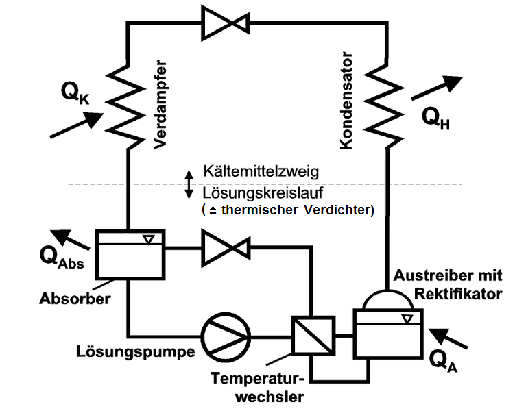 Absorptionskältemaschine